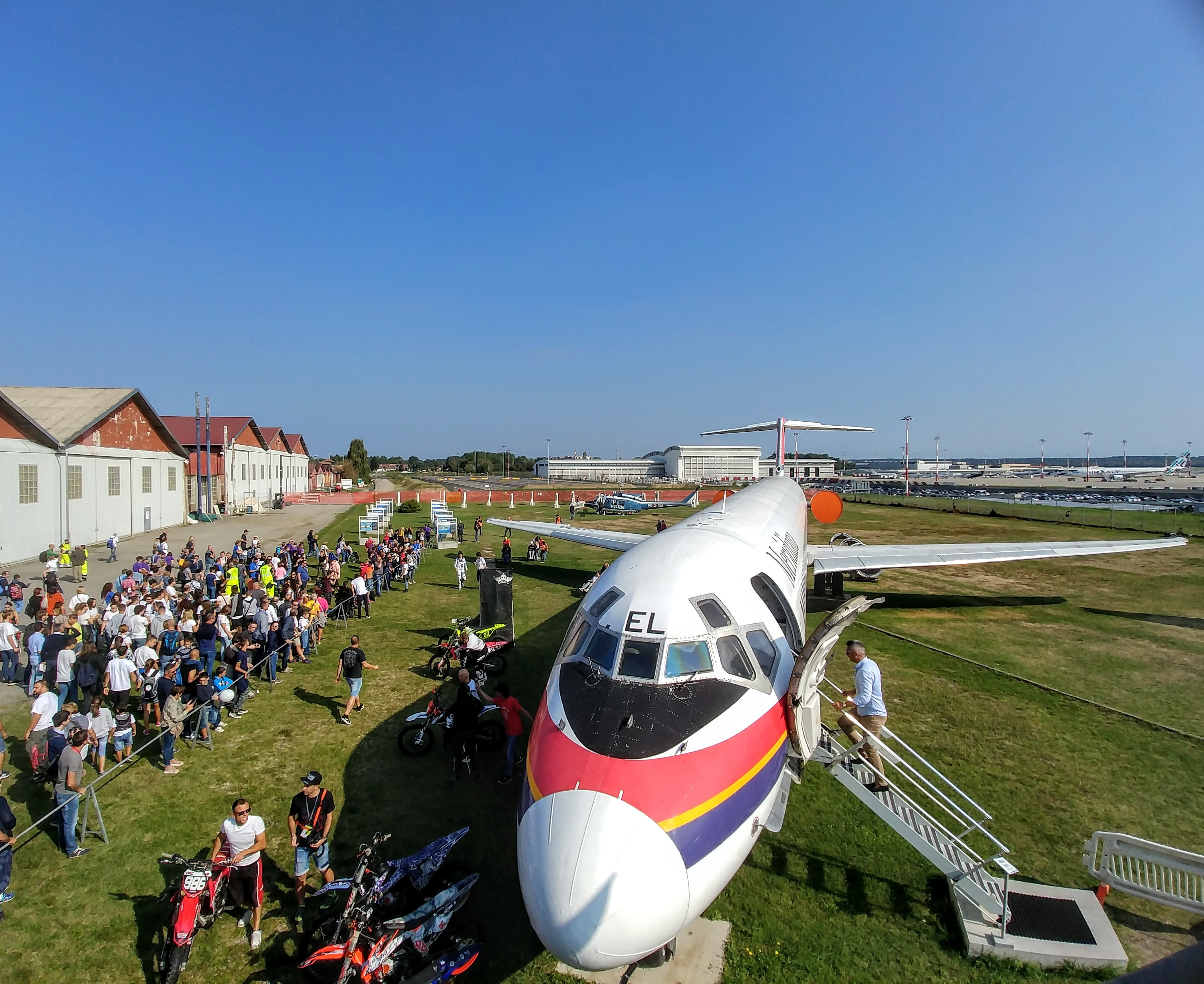 MD 80 mai paura